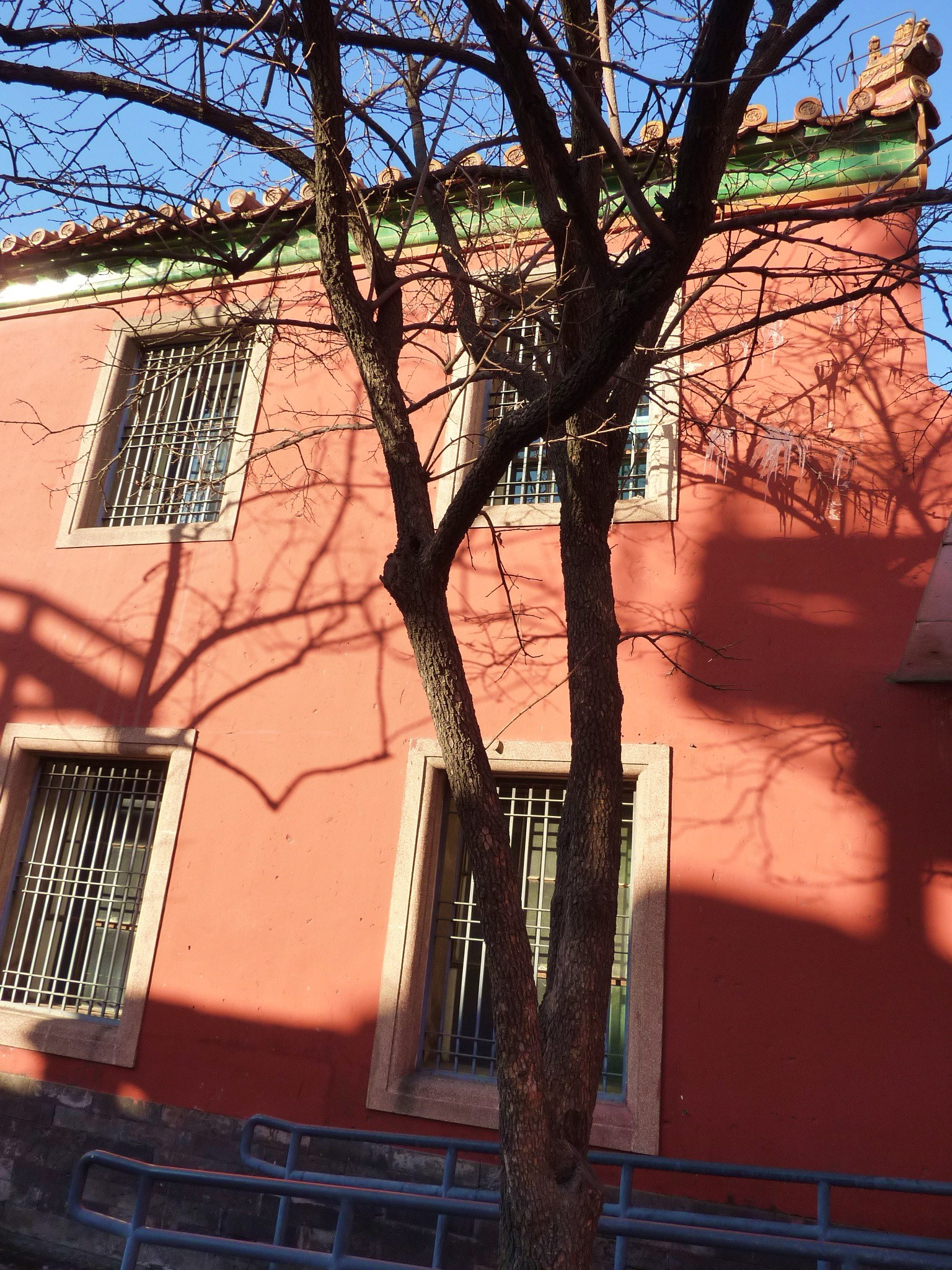 ·˙·ChinaUli2010·.· Beijing - Forbidden Town 故宫延禧宫